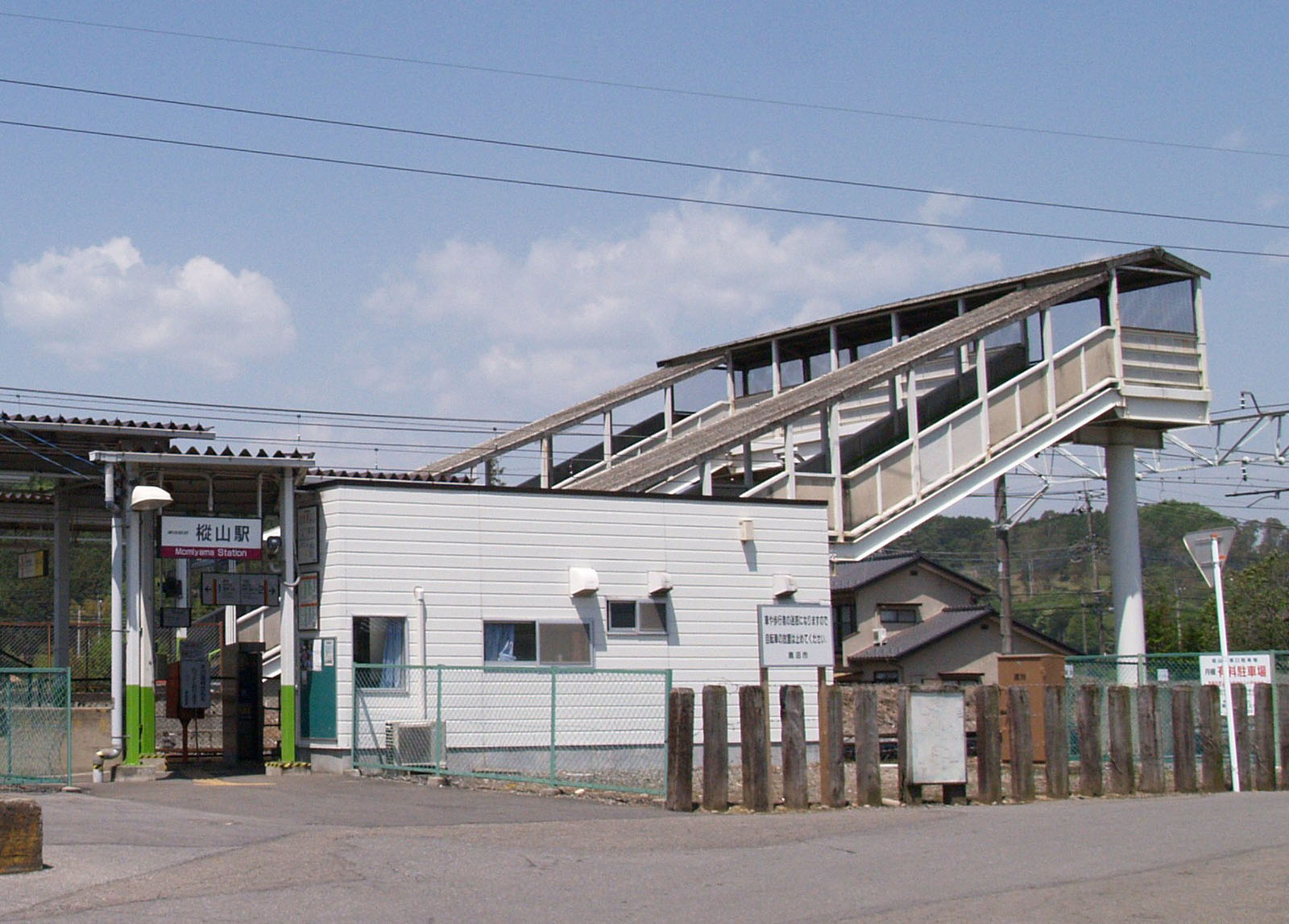 樅山駅駅舎